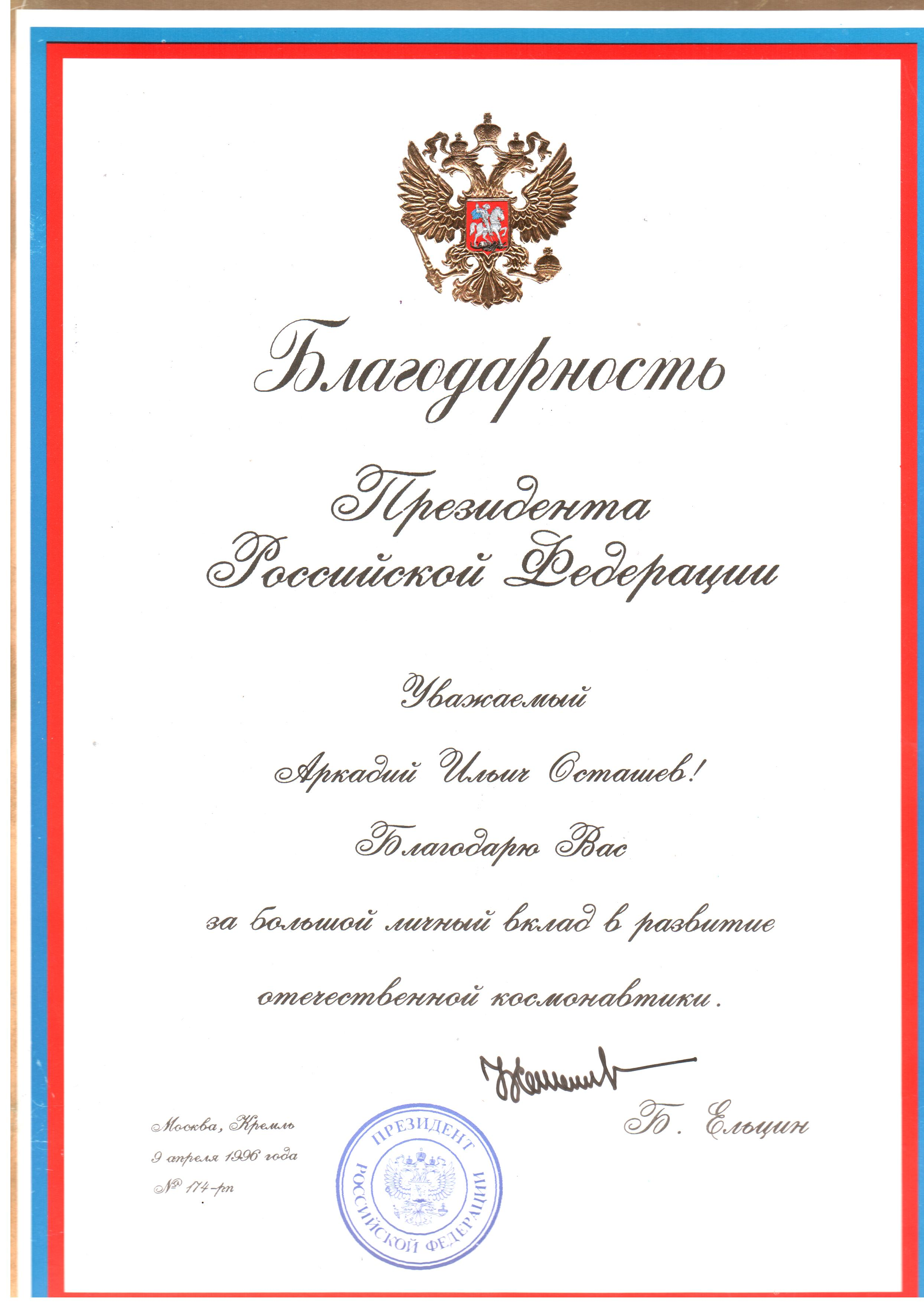 Благодарность Президента РФ за большой личный вклад в развитие отечественной космонавтики.